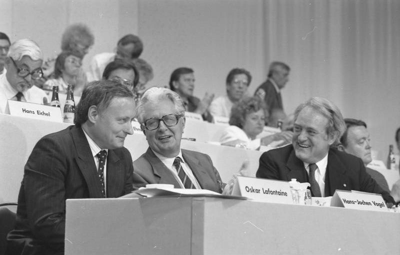 30.8-2.9.1988 SPD-Parteitag in Münster, Halle Münsterland